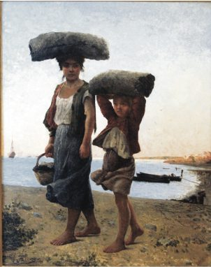 Pintura las playeras museo historico o´higginiano